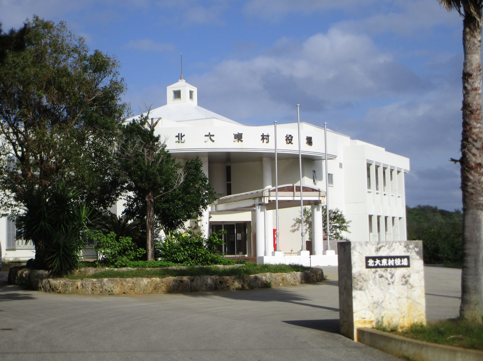 北大東村役場